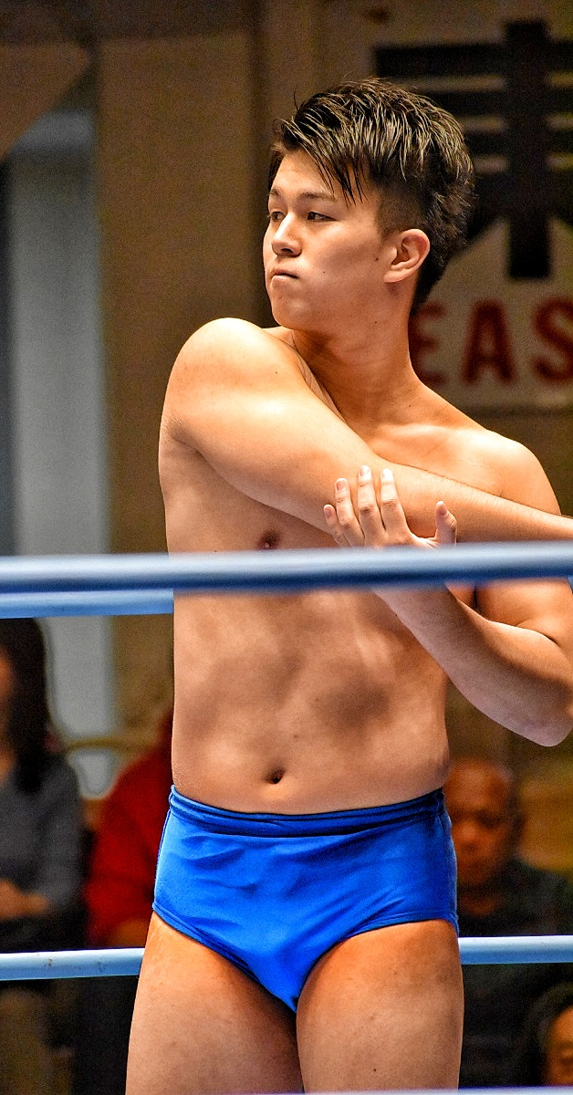 プロレスラーの青柳亮生